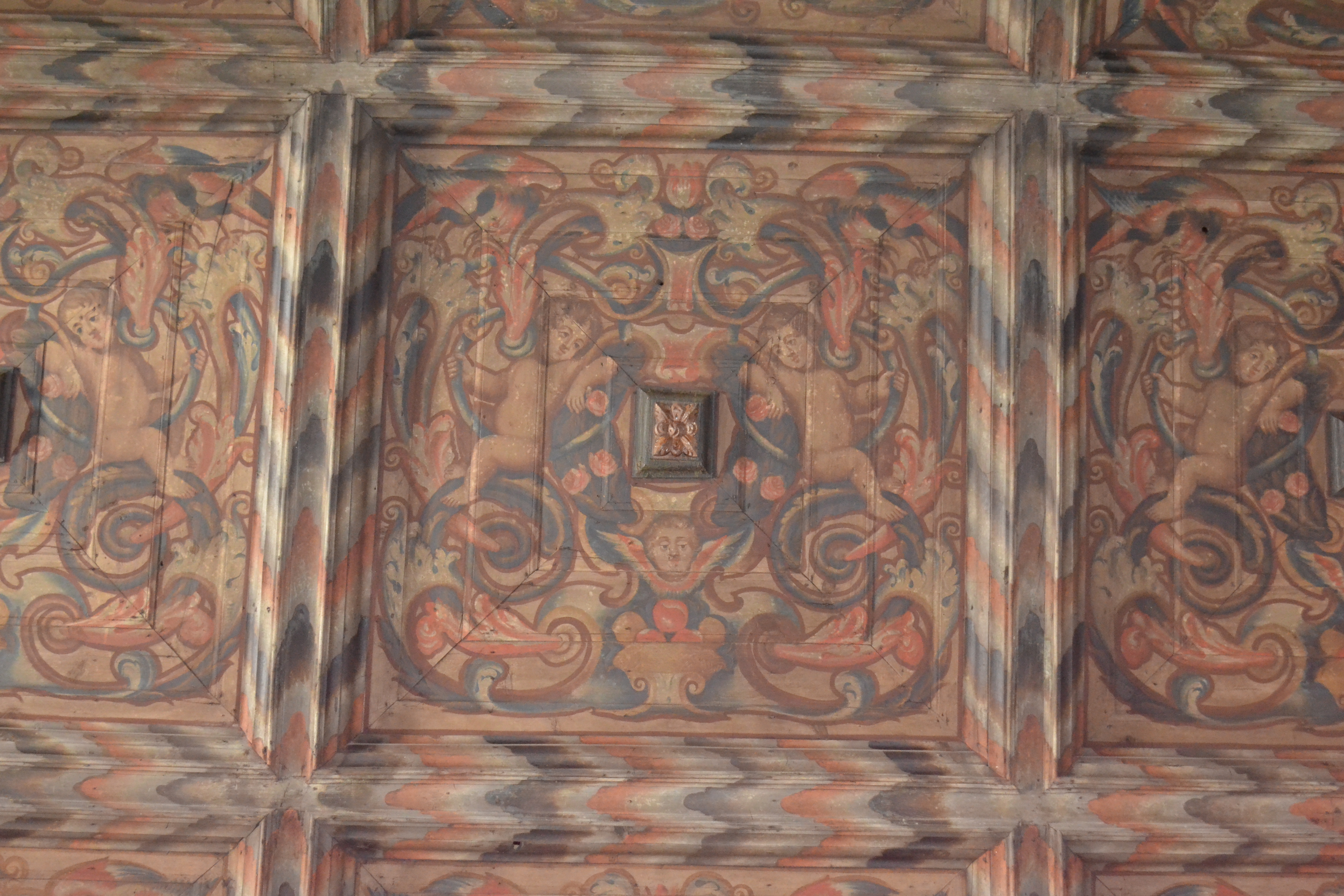 Tecto de caixotões com frescos